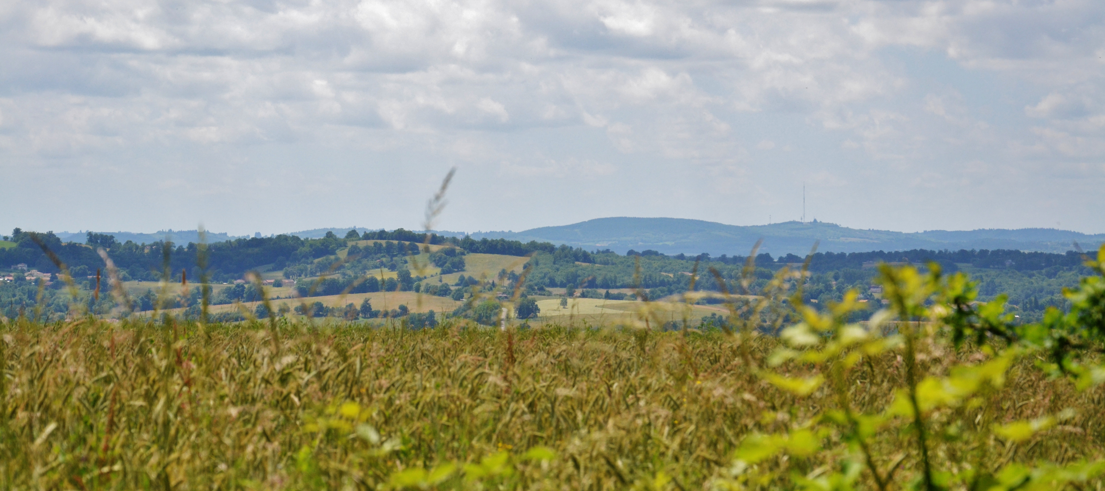 Vue sur les hauteurs des monts de Châlus (secteur de la forêt des Cars et de la forêt de Lastours, 540-554m), vus depuis Solignac, à environ 20km au nord-est du massif.